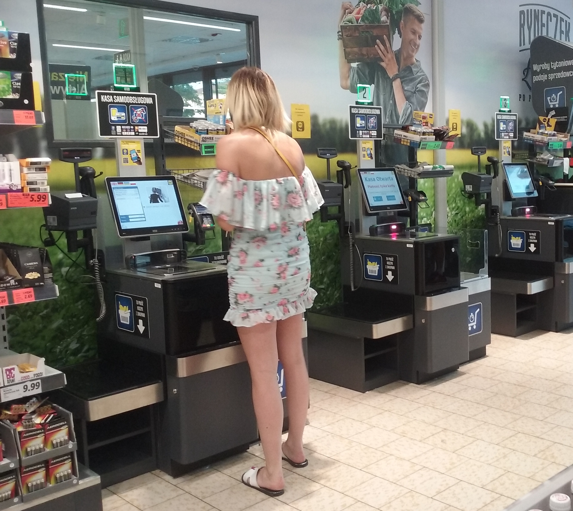 Kasy samoobslugowe w Lidlu w Tomaszowie Mazowieckim, w województwie łódzkim.